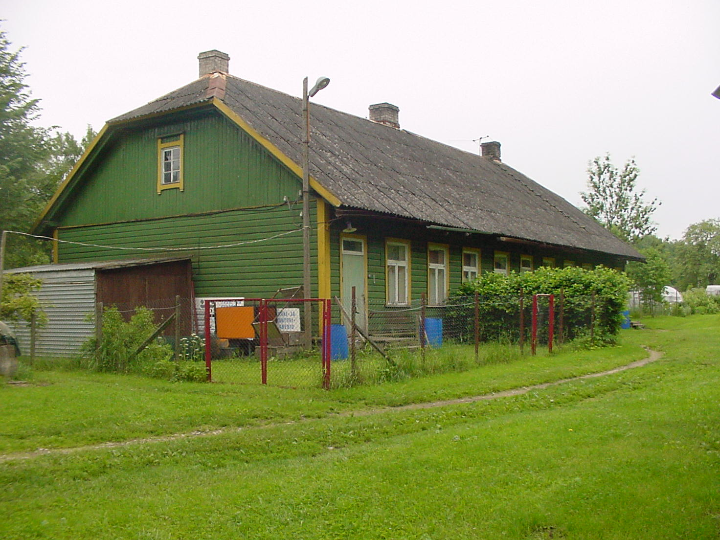 Aiamaa raudteepeatuskoha elamu, Järiste küla